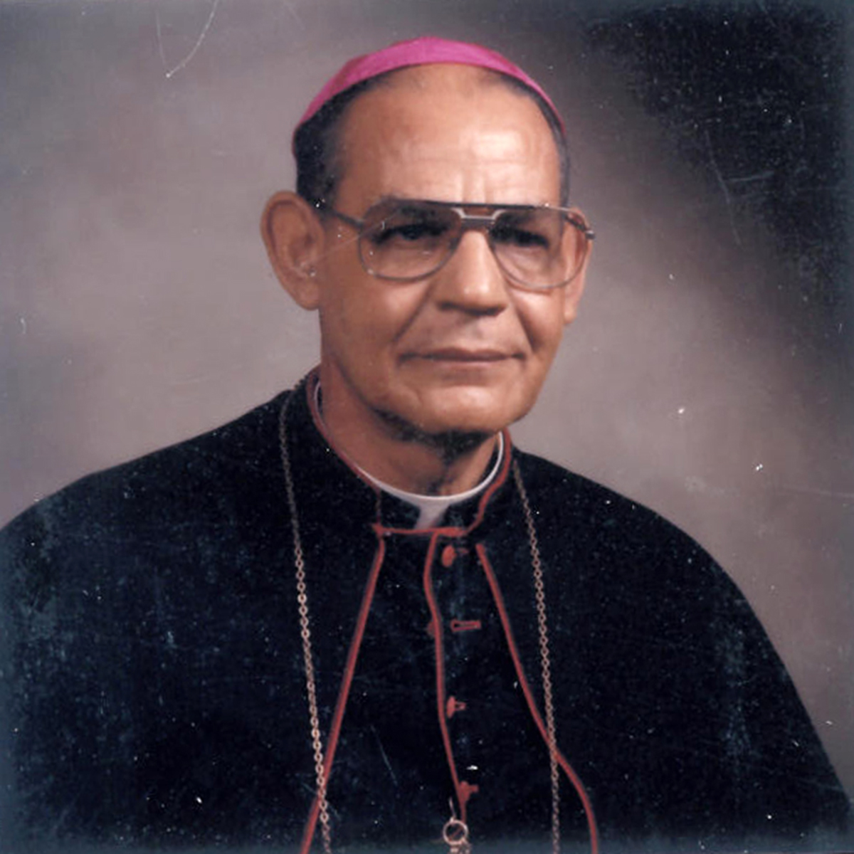 Imagen de Mons. Juan Antonio Flores Santana